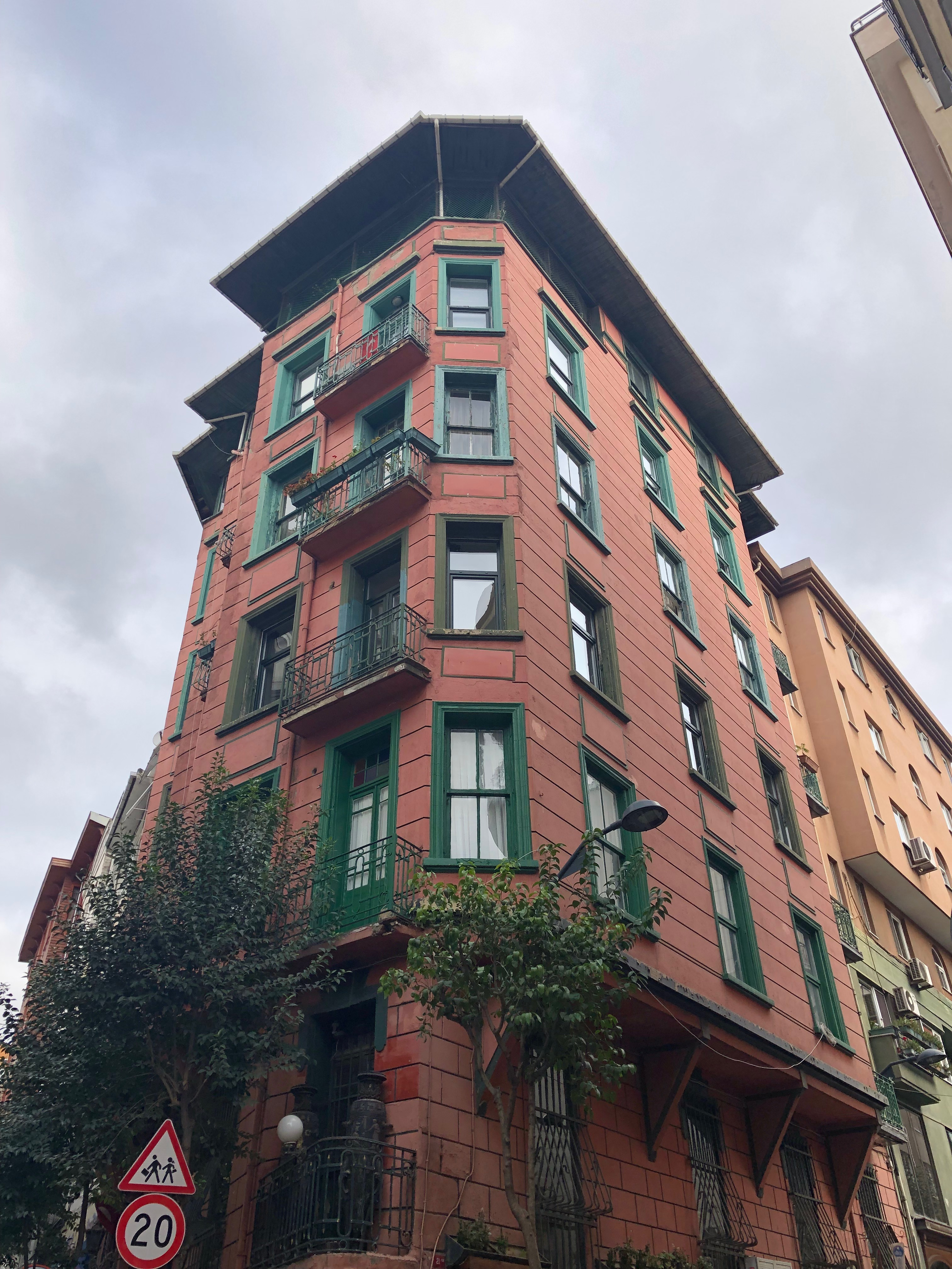 Konum olarak Nişantaşı Zafer Sokak'ta bulunur.